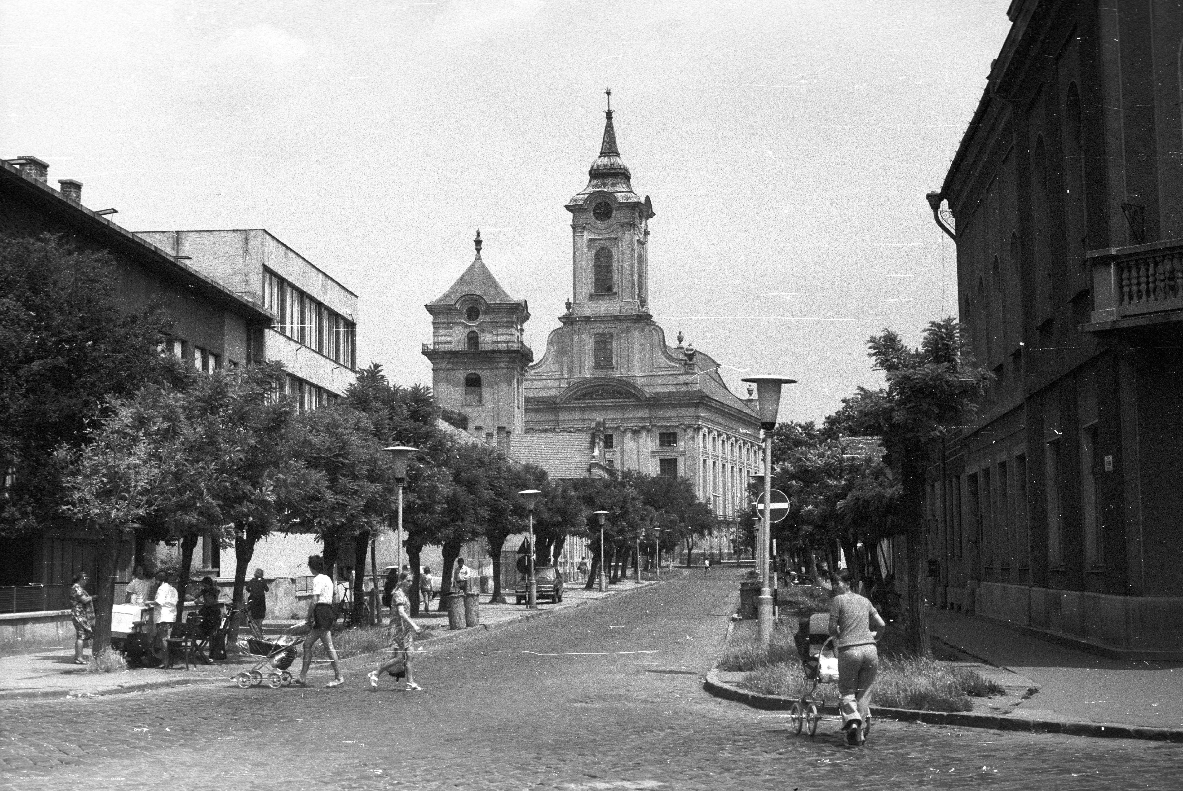 Luther utca az evangélikus Nagytemplom felé nézve, balra az evangélikus Kistemplom (Öregtemplom). Location: Hungary, Békéscsaba Title: Luther utca az evangélikus Nagytemplom felé nézve, balra az evangélikus Kistemplom (Öregtemplom).